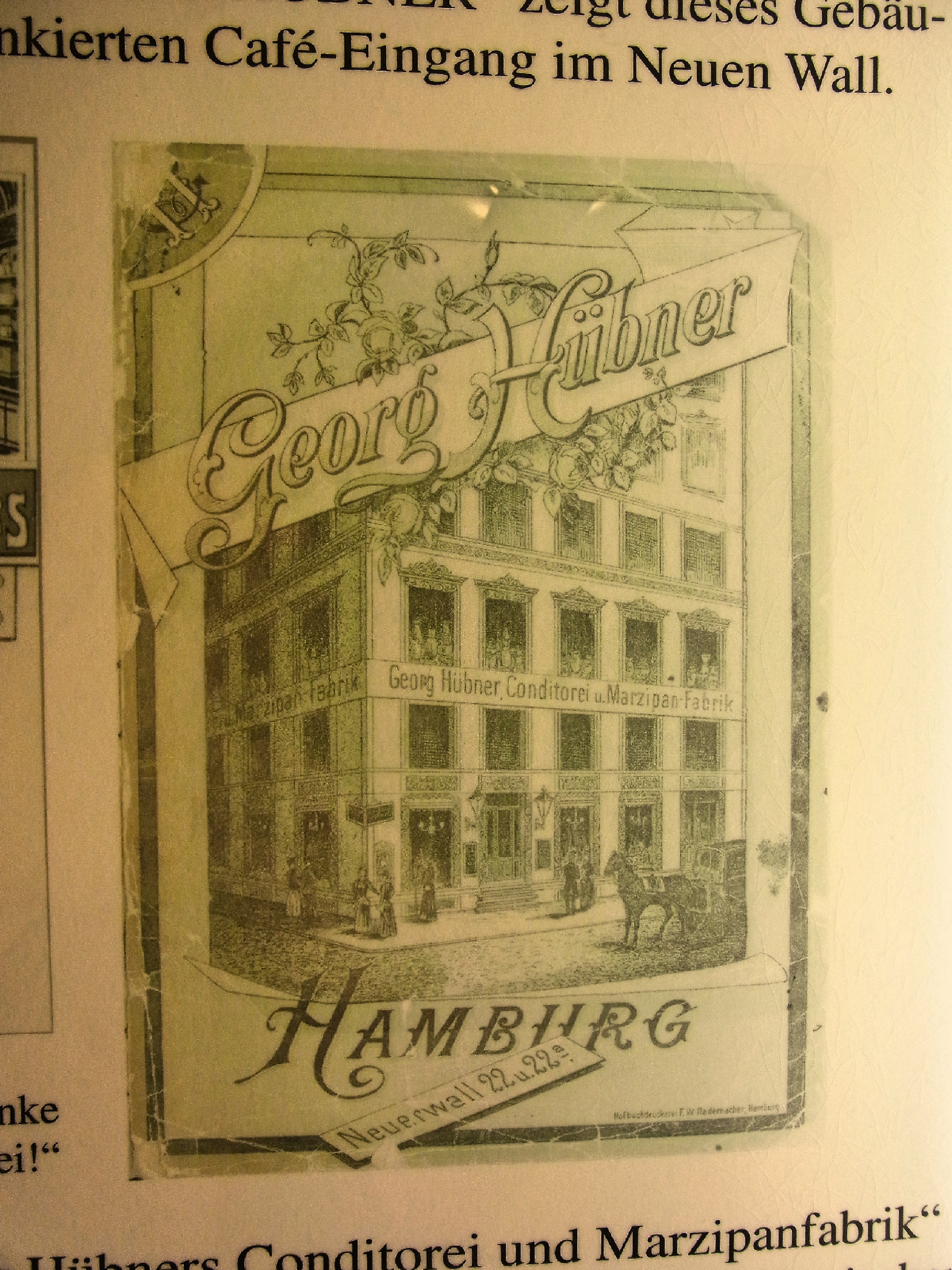 Illustration in der Vitrine des Cafe´Hübner. Alle Fotos sind Abfotografien und können durch Beleuchtung der Vitrine und des Treppenhauses farblich abweichen.